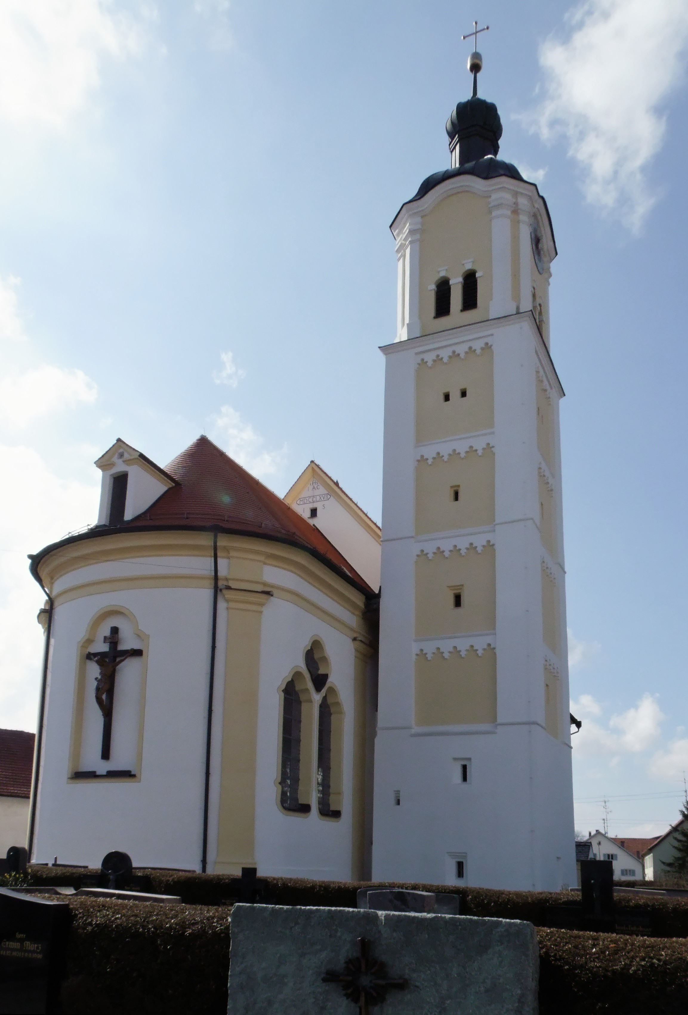 St. Magnus in Unterrammingen in Oberschwaben